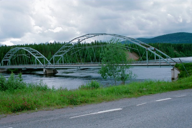 Bron över Piteälven. (Foto: Curt Löfwenberg)